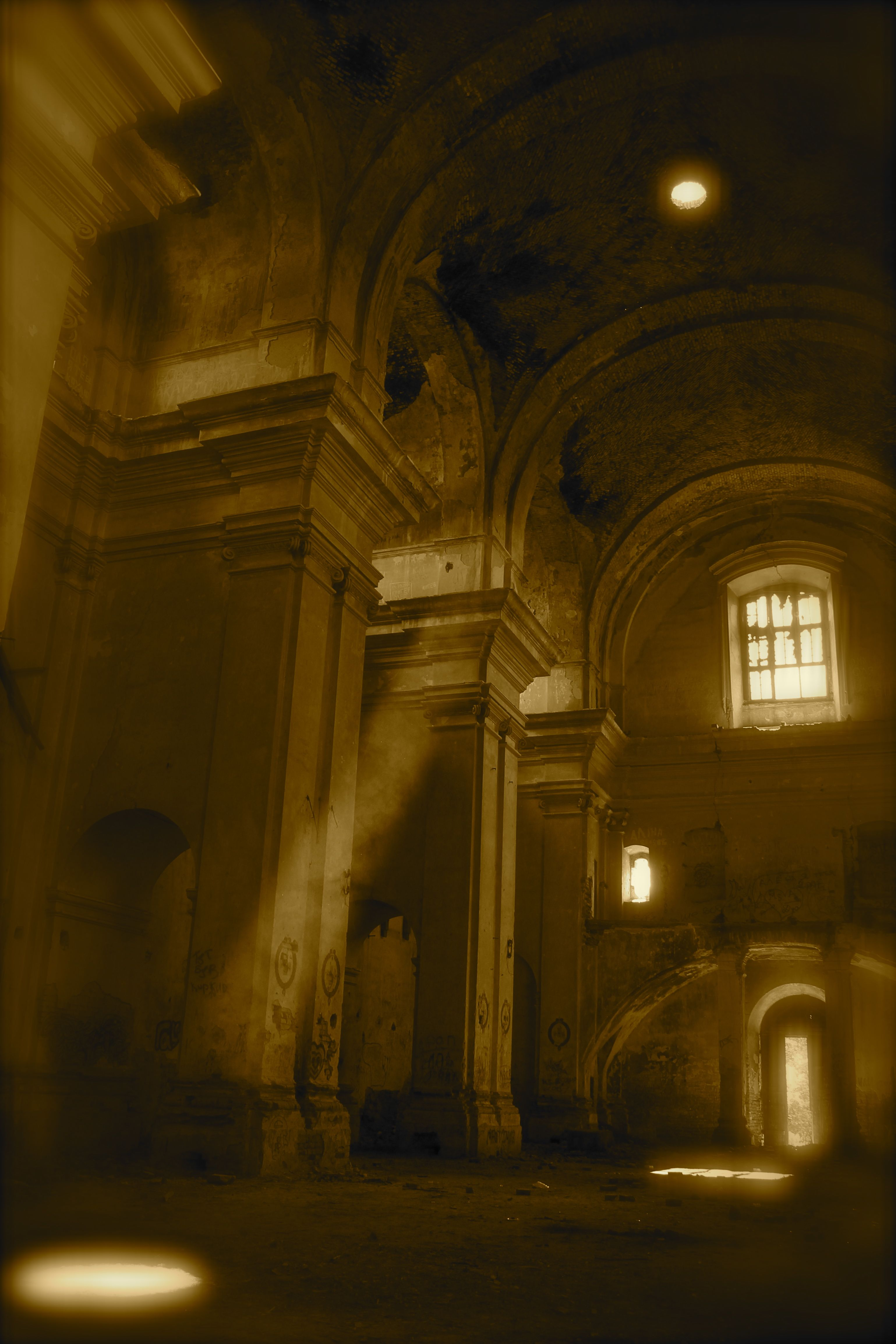 Напівзруйнований костел у Великих Межирічах